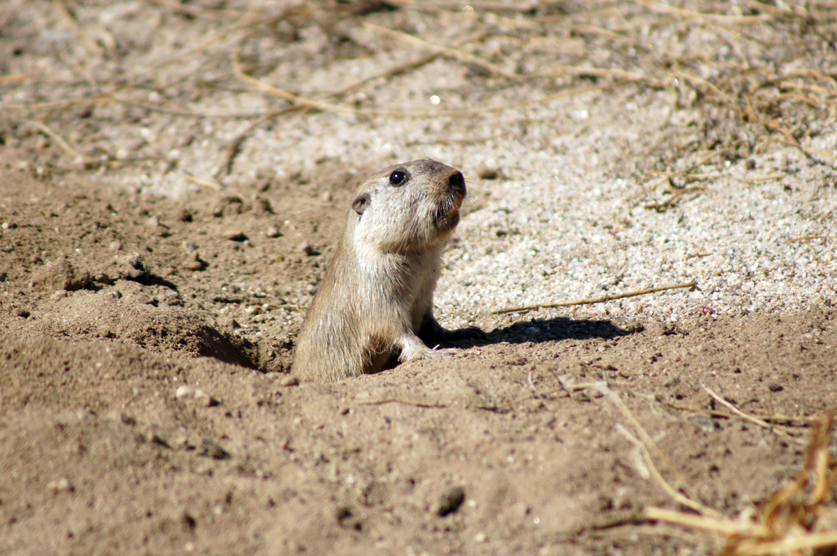 Ctenomys tucumanus. Tucu tucu. Imagen obtenida en los Valles Calchaquíes (Tolombón, Salta)